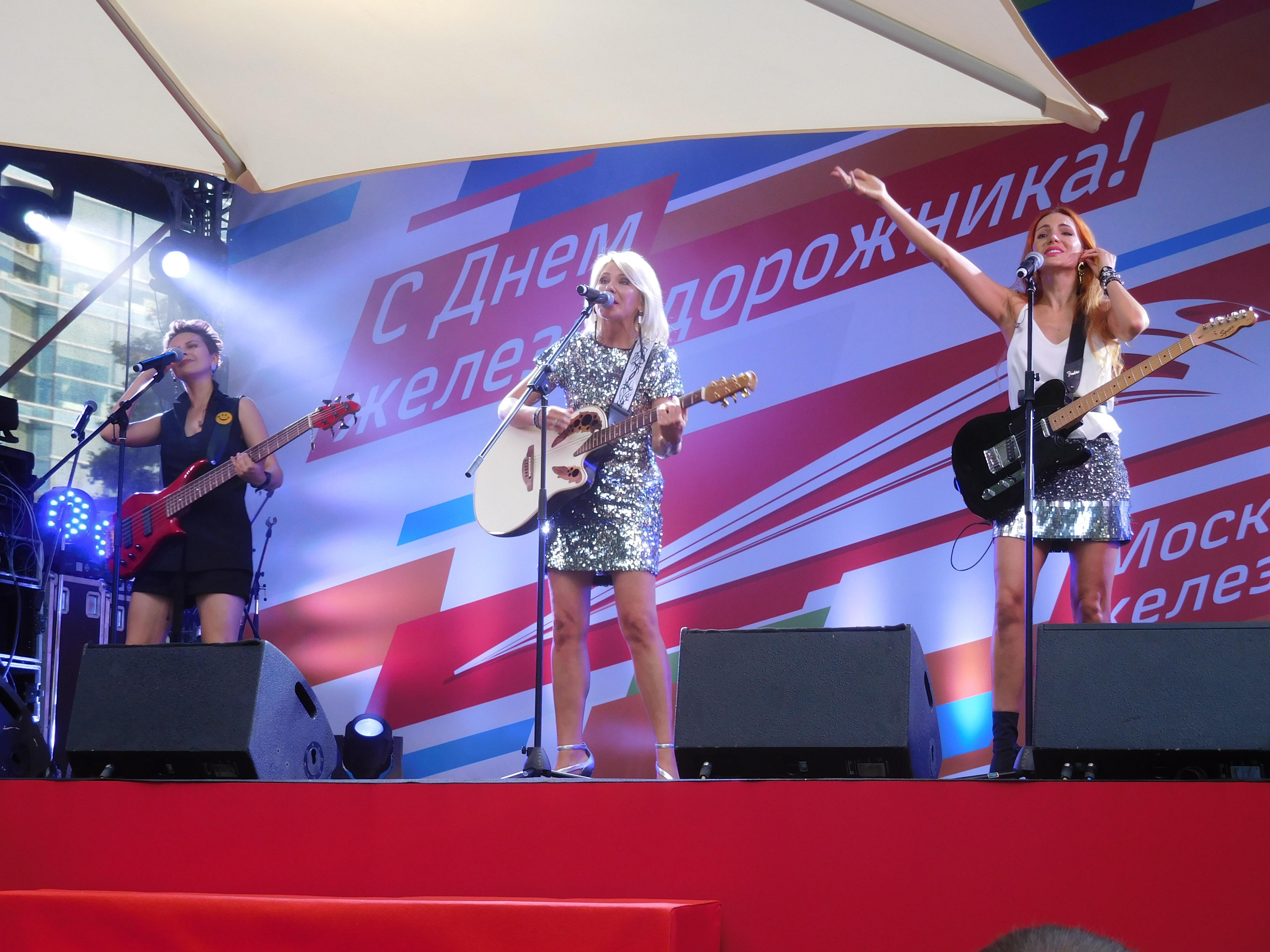 Группа «Лицей» в 2018 году (Екатерина Непрук, Анастасия Макаревич, София Тайх)